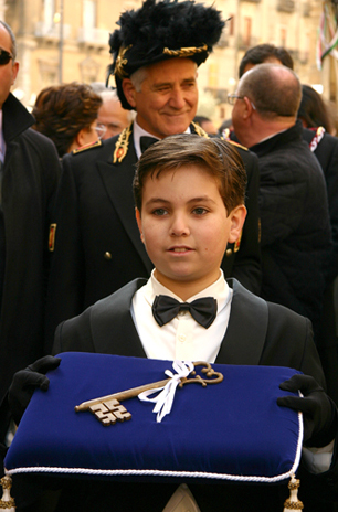 Capitano e Paggetto con le chiavi della città alla processione della Real Maestranza a Caltanissetta.